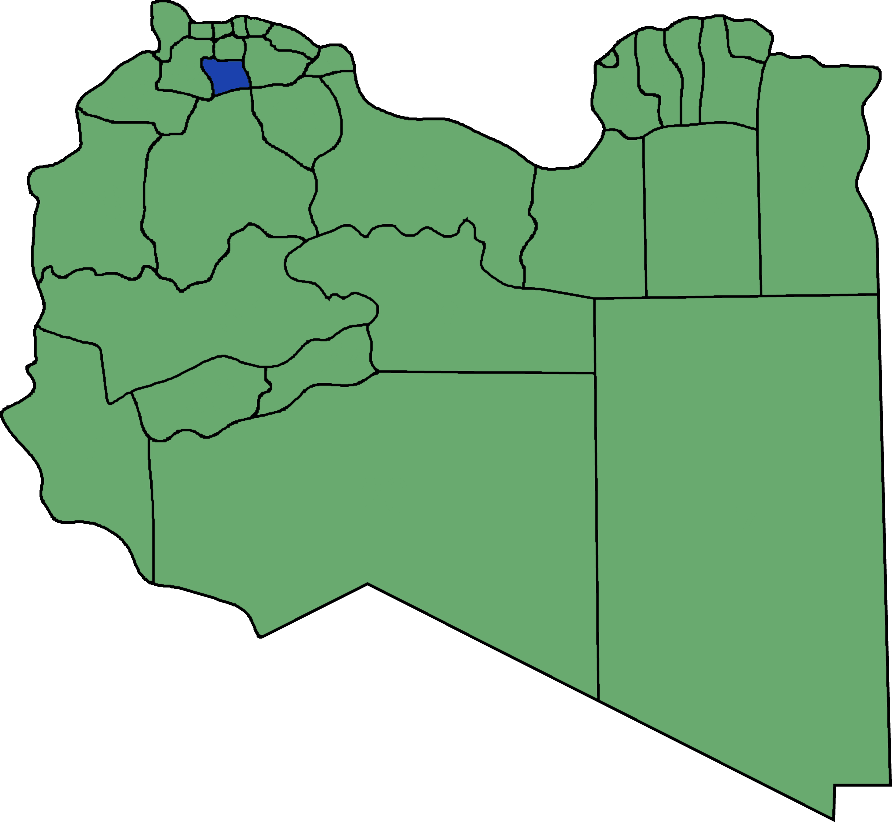 Die neuen Gemeinden (Munizipien) in Libyen. Gharyan hervorgehoben.